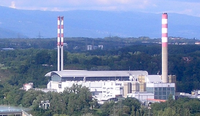 Usine d’incinération des Cheneviers, canton de Genève.